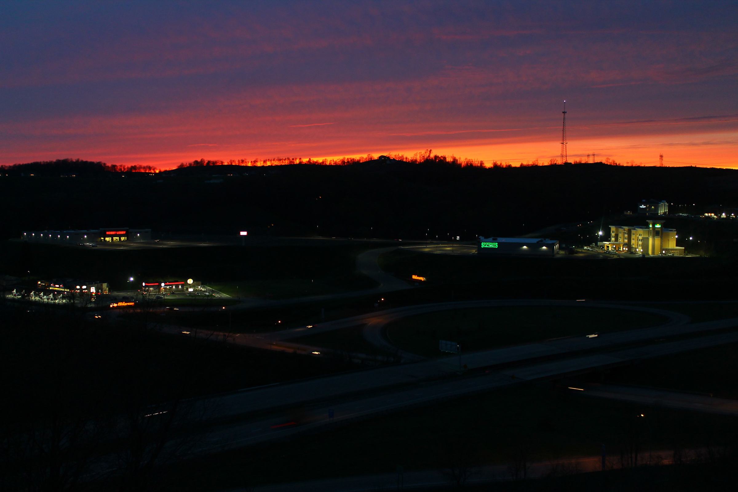 Sunset on Granville, West Virginia